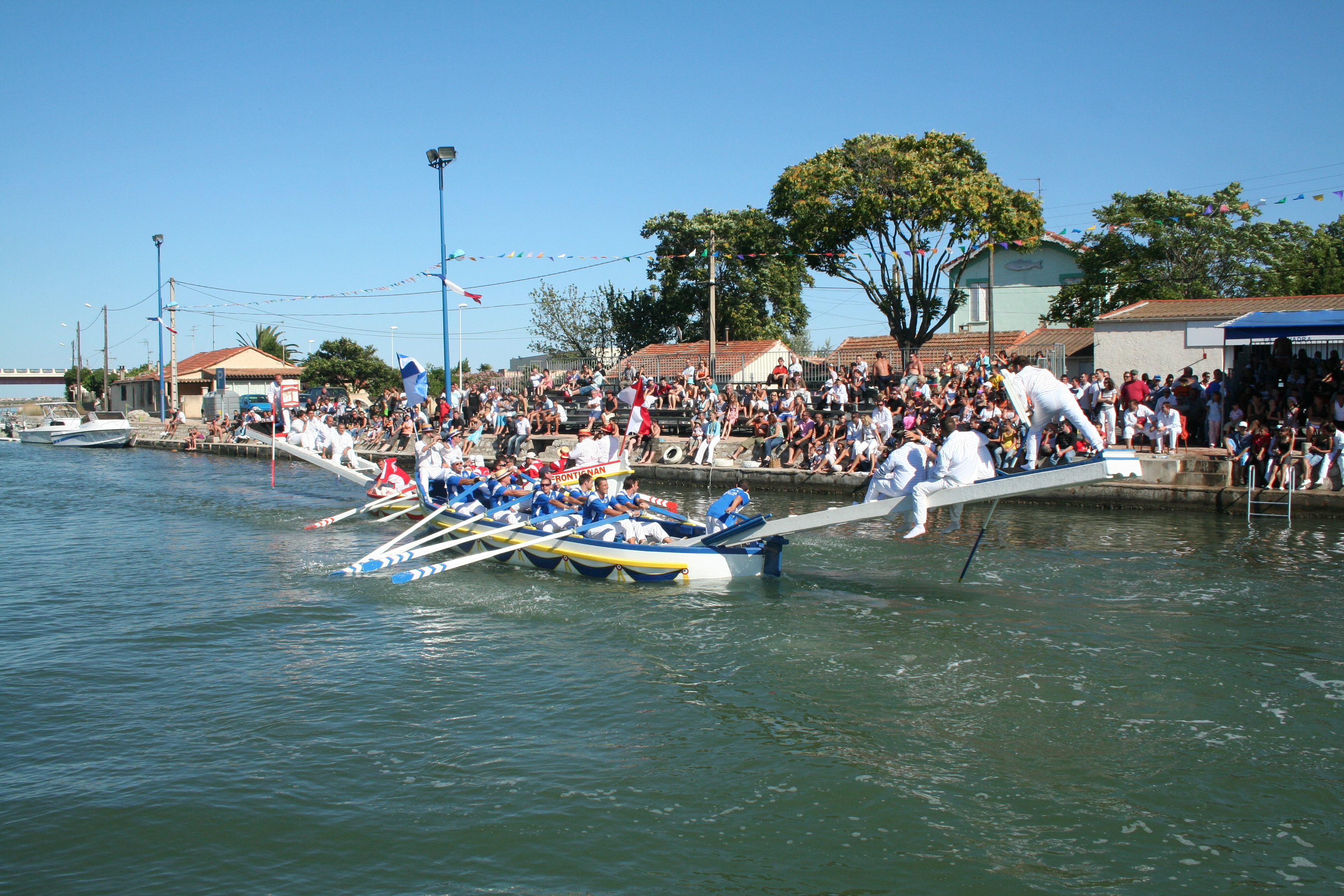 Frontignan (Hérault) - tournoi de joutes 2008.